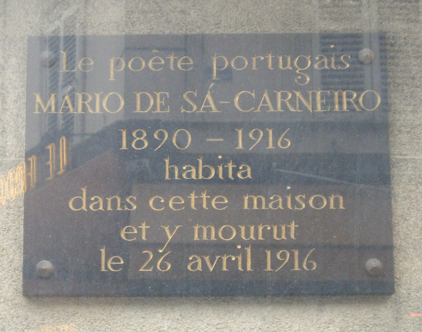 Plaque commémorative sur la façade de l'actuel hôtel Grand Pigalle, anciennement hôtel de Nice, 29 rue Victor-Massé, Paris 9e.« Le poète portugais Mário de Sá-Carneiro, 1890-1916, habita dans cette maison et y mourut le 26 avril 1916. »